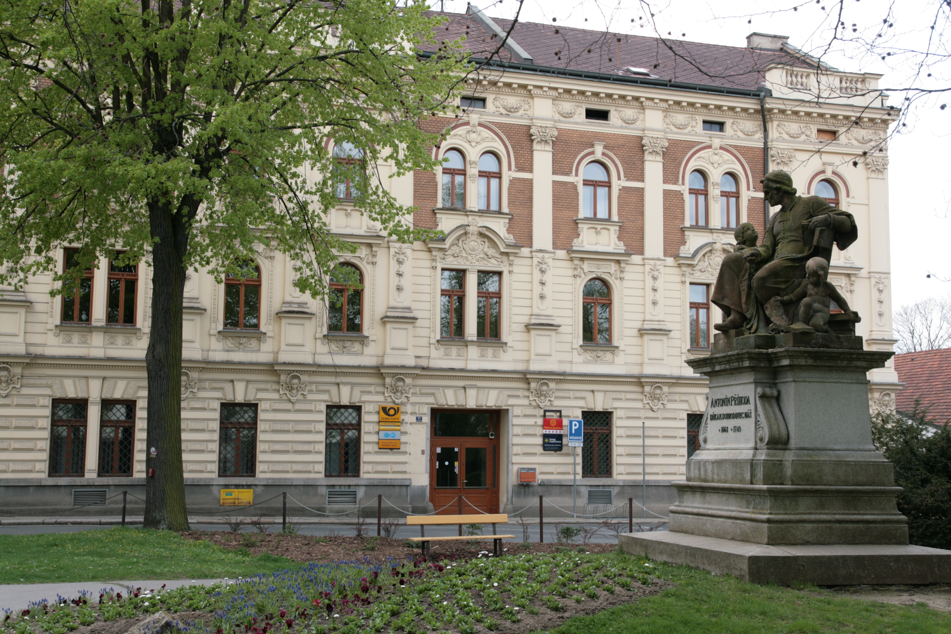 Město Domažlice. Pomník děkana Antonína Příhody v Příhodových sadech. V pozadí budova pošty, čp. 71 v ulici Msgre. B. Staška.